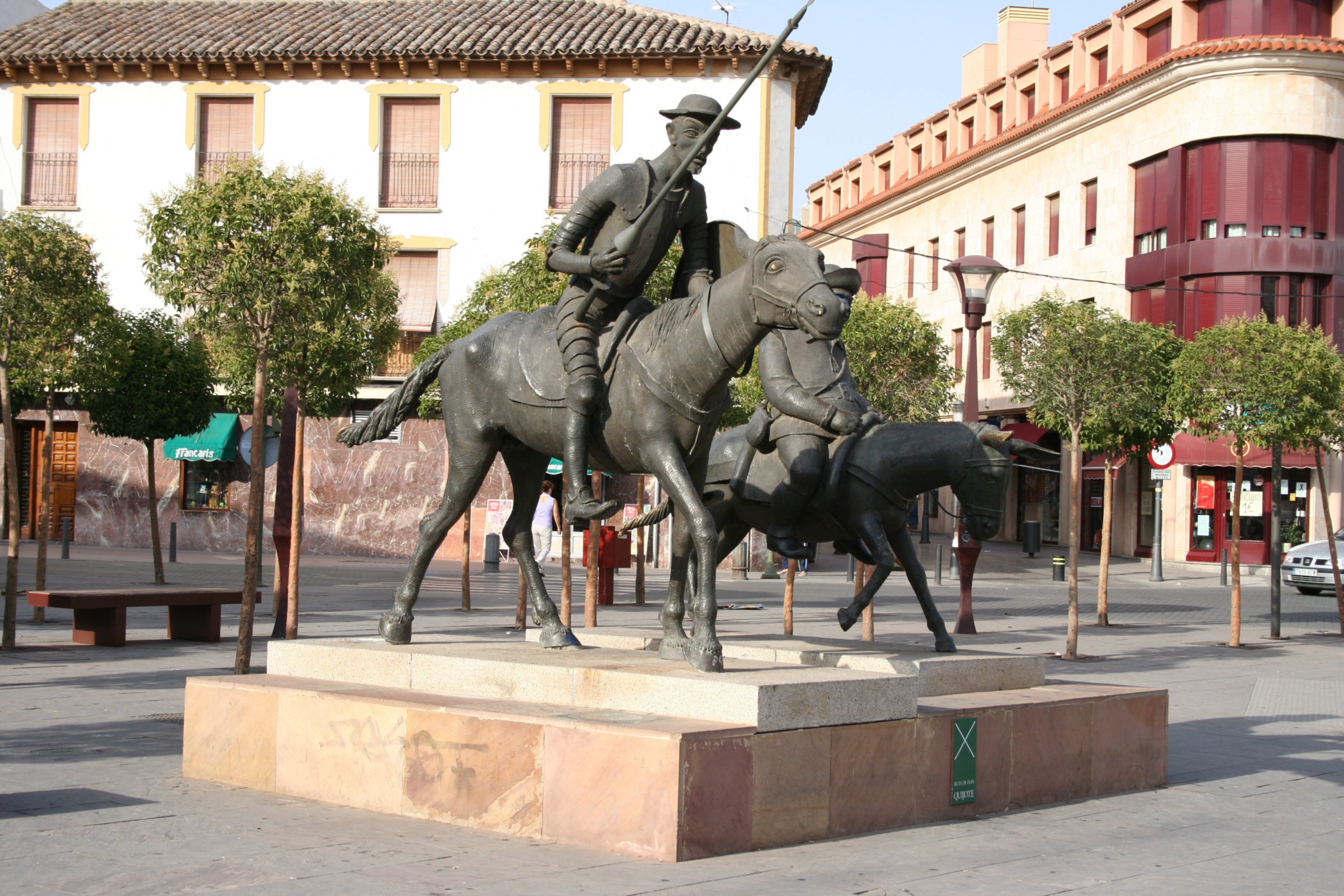 Estatua dedicada a Don Quijote y Sancho Panza, personajes de la novela El ingenioso hidalgo Don Quijote de la Mancha de Miguel de Cervantes